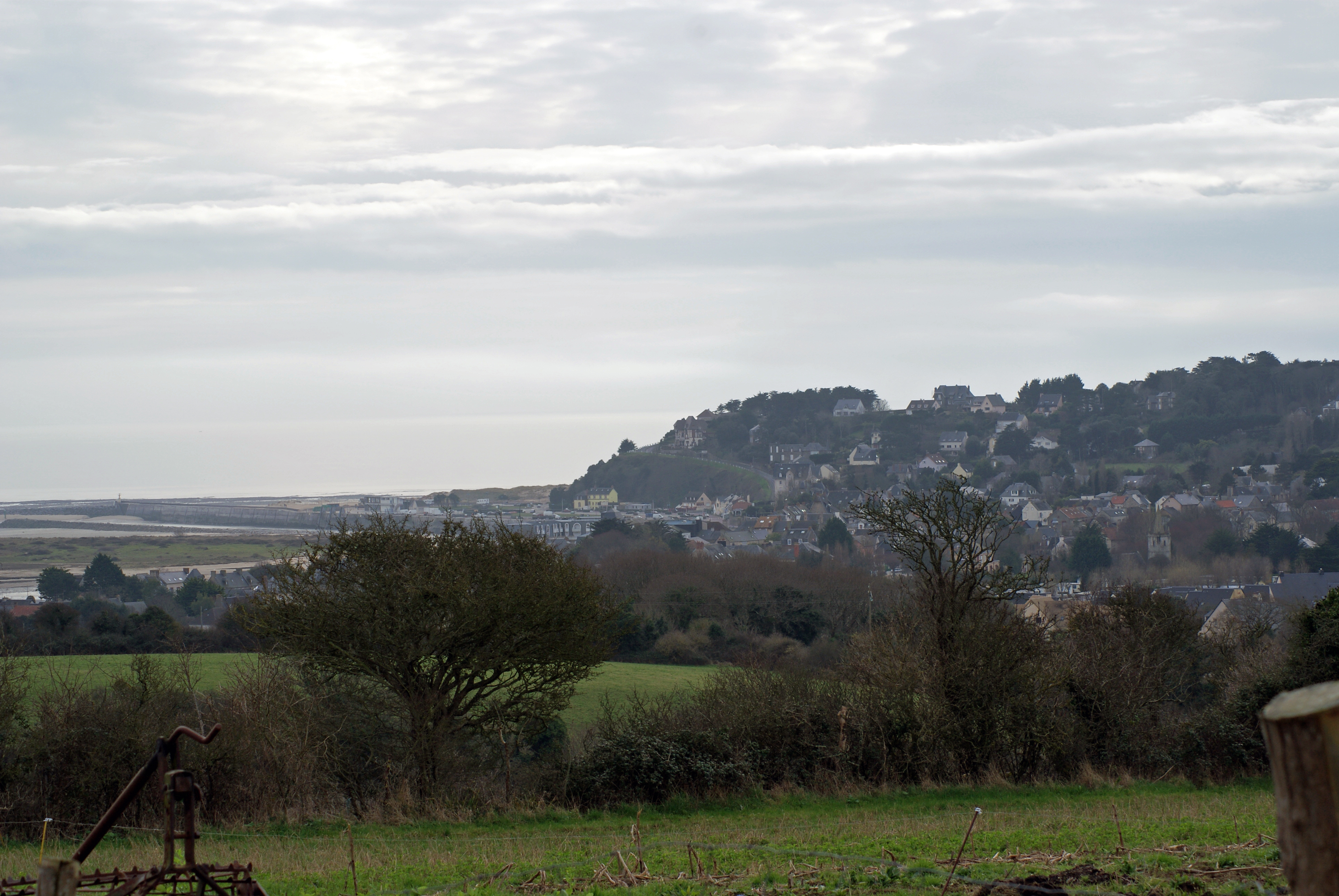 La ville et le port de Carteret Cotentin Manche Normandie France